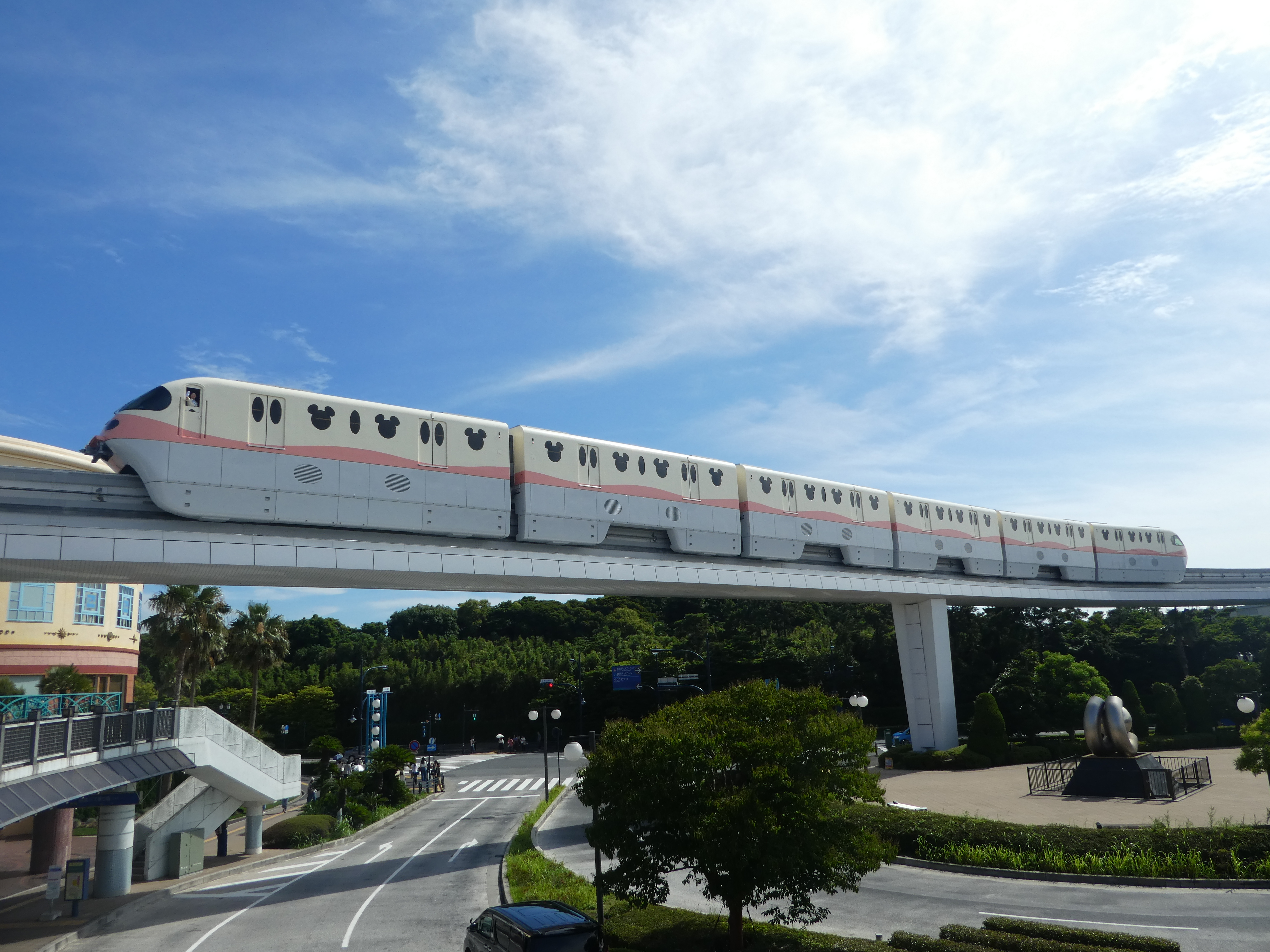 ディズニーリゾートライン第5編成(ピーチ)の写真です。車掌さんが手を振っているところにも注目。